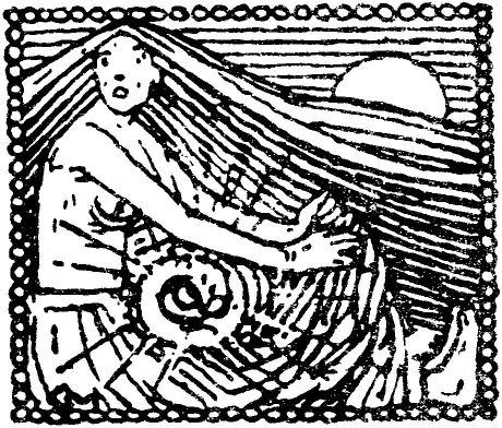 Gerhard Munthe: Illustration for Eiriksønnenes saga. Snorre 1899-edition. vignett 3